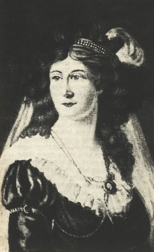 Portrait der deutschen Autorin Emilie von Berlepsch (1755-1830), gemalt vermutlich von V. Sonnenschein, wurde später als Stich von M. G. Eichler veröffentlicht.